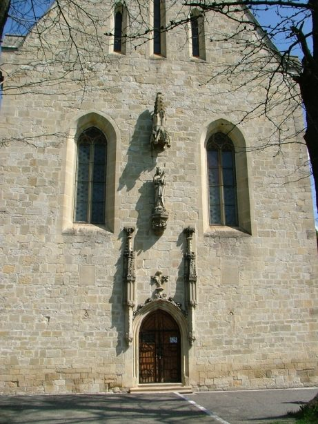 Calvaria Church in Cluj-Napoca - detail, Romania